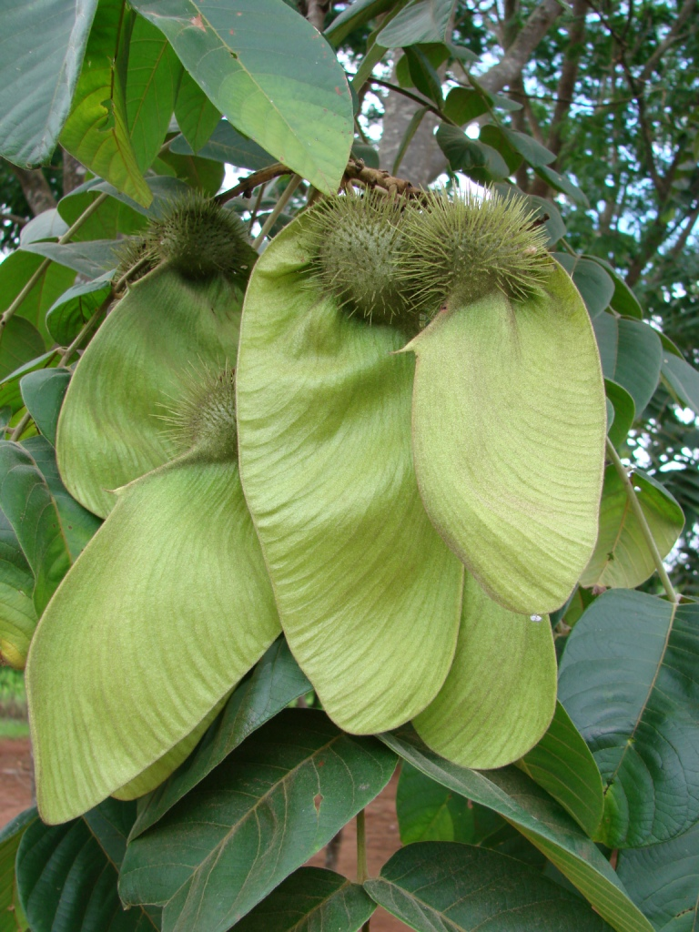 Centrolobium tomentosum - FABACEAE Brasília - Asa Norte - Distrito Federal - Brasil.